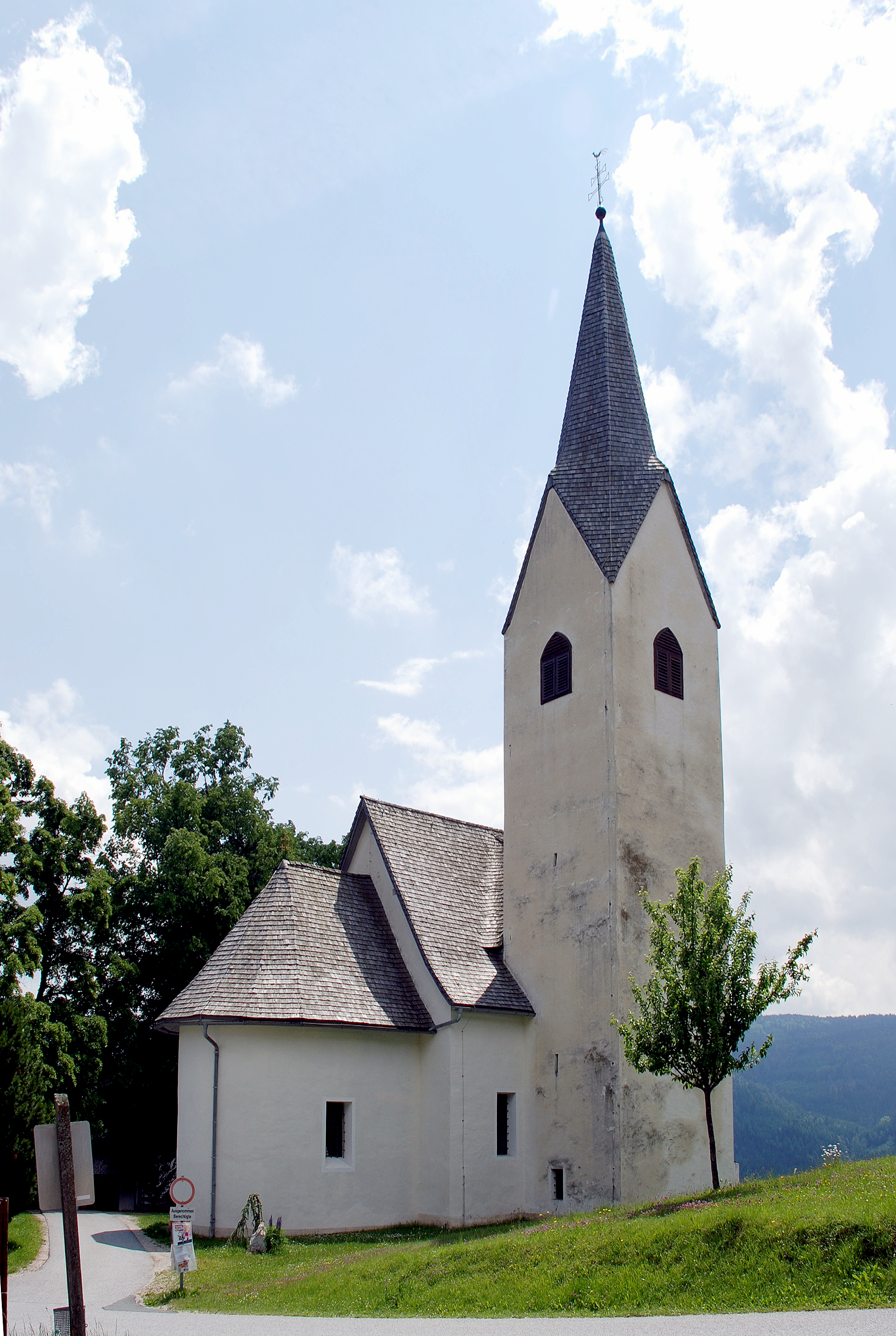 Soboth, Steiermark, Österreich: Pfarrkirche